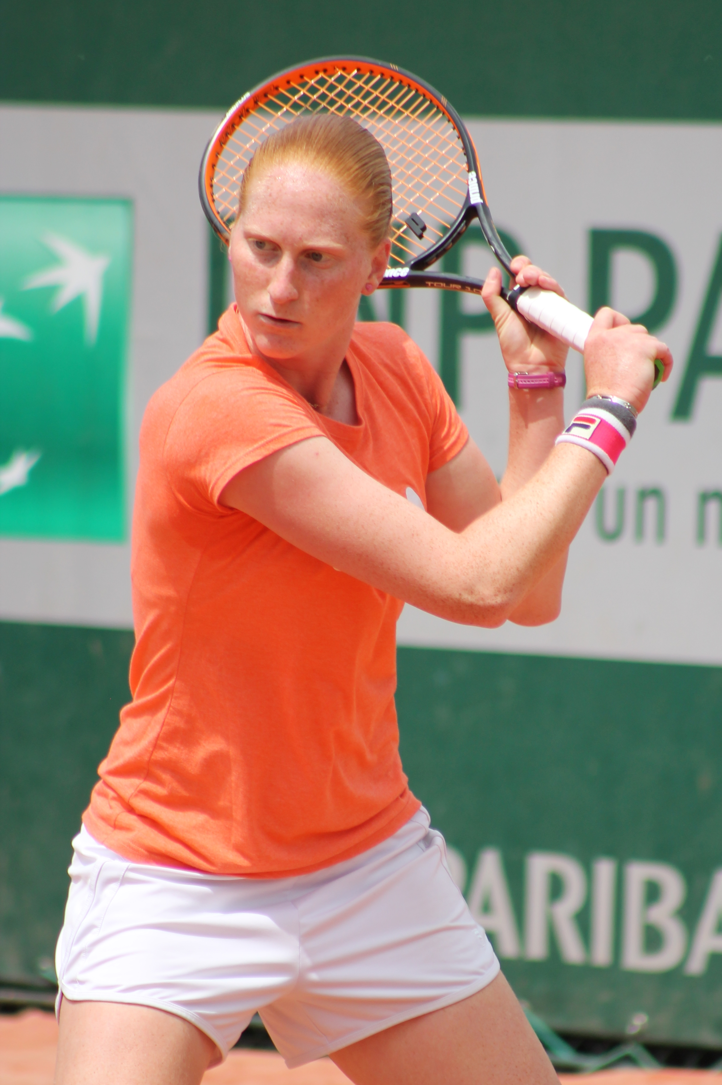 Van Uytvanck RG15 (4)